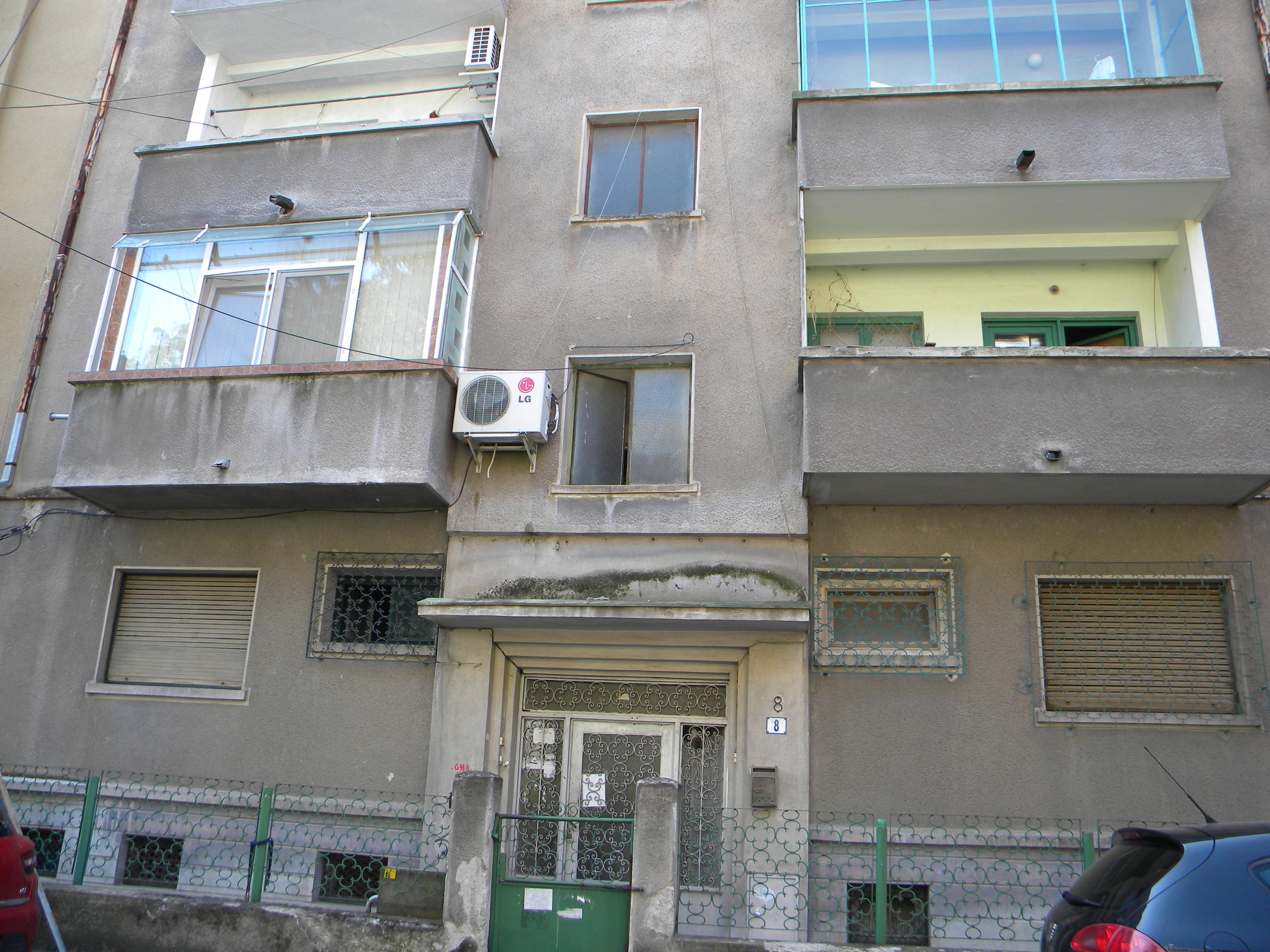 Bucuresti, Romania, Imobil pe Str. Naum Ramniceanu nr. 8, B-II-m-B-19527